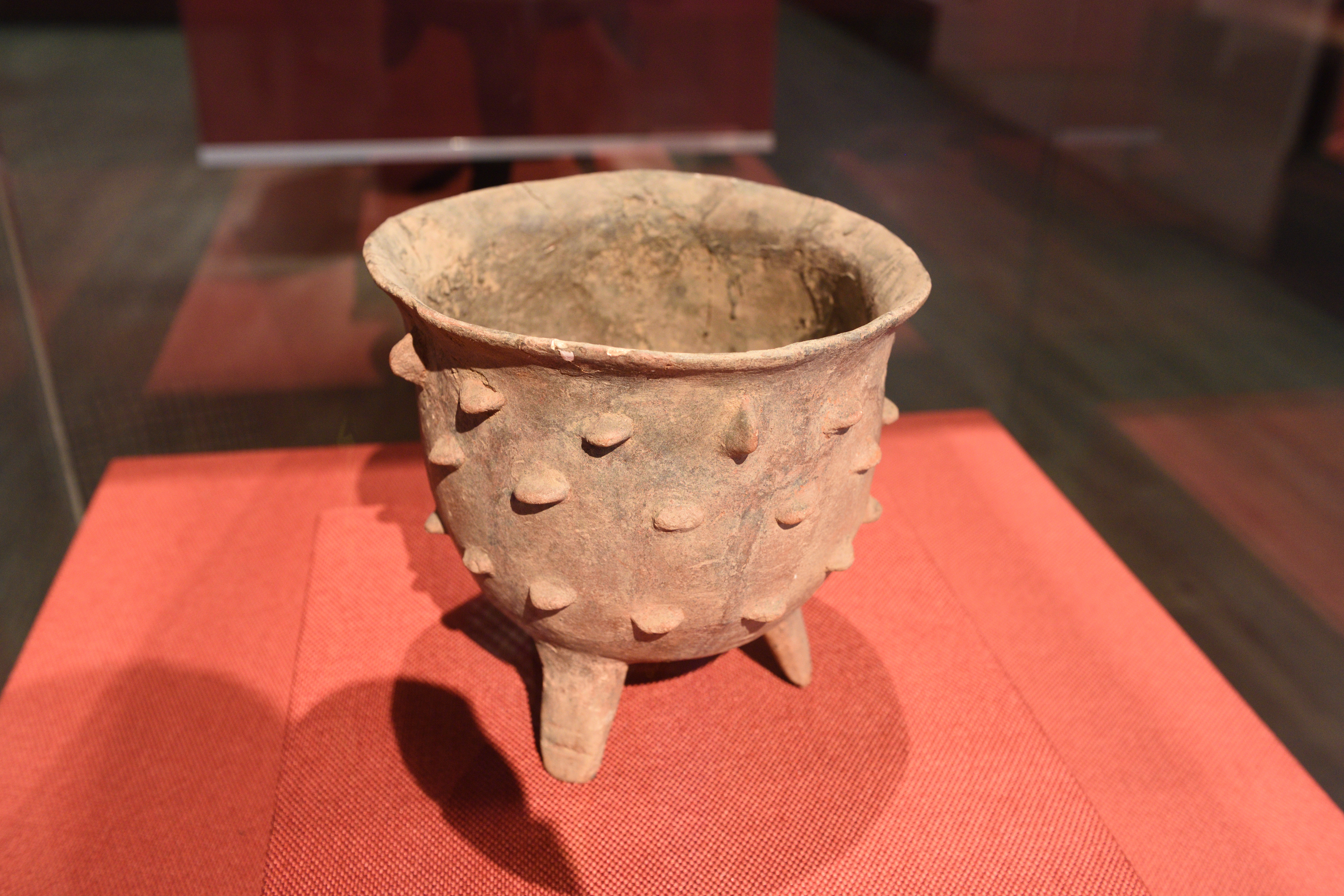 新郑裴李岗出土乳钉纹红陶鼎，2016年杭州良渚博物院“鼎盛中华”特展展出